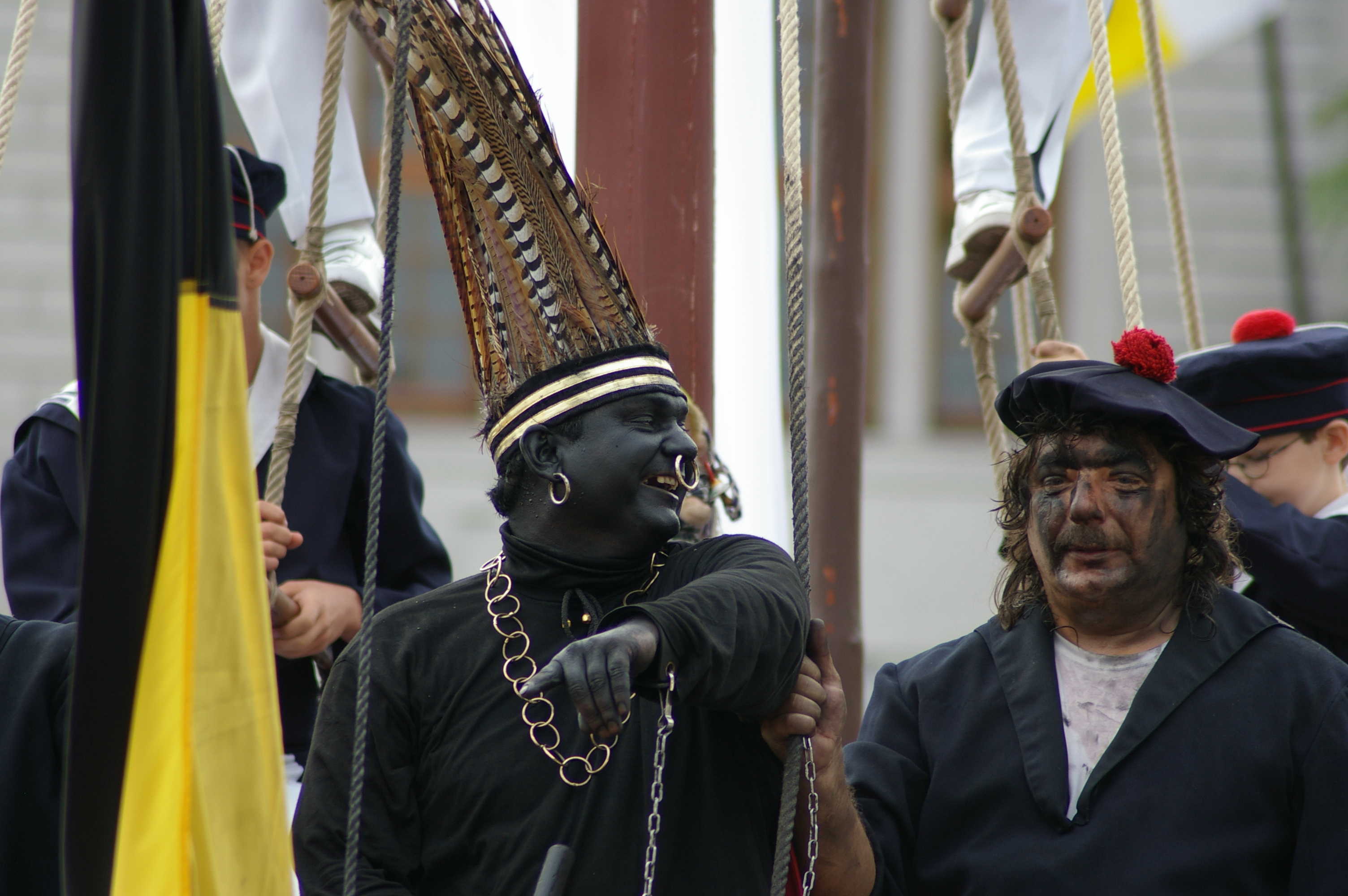 Le "Sauvage" de La Barque des pêcheurs napolitains, Ducasse d'Ath, 2008